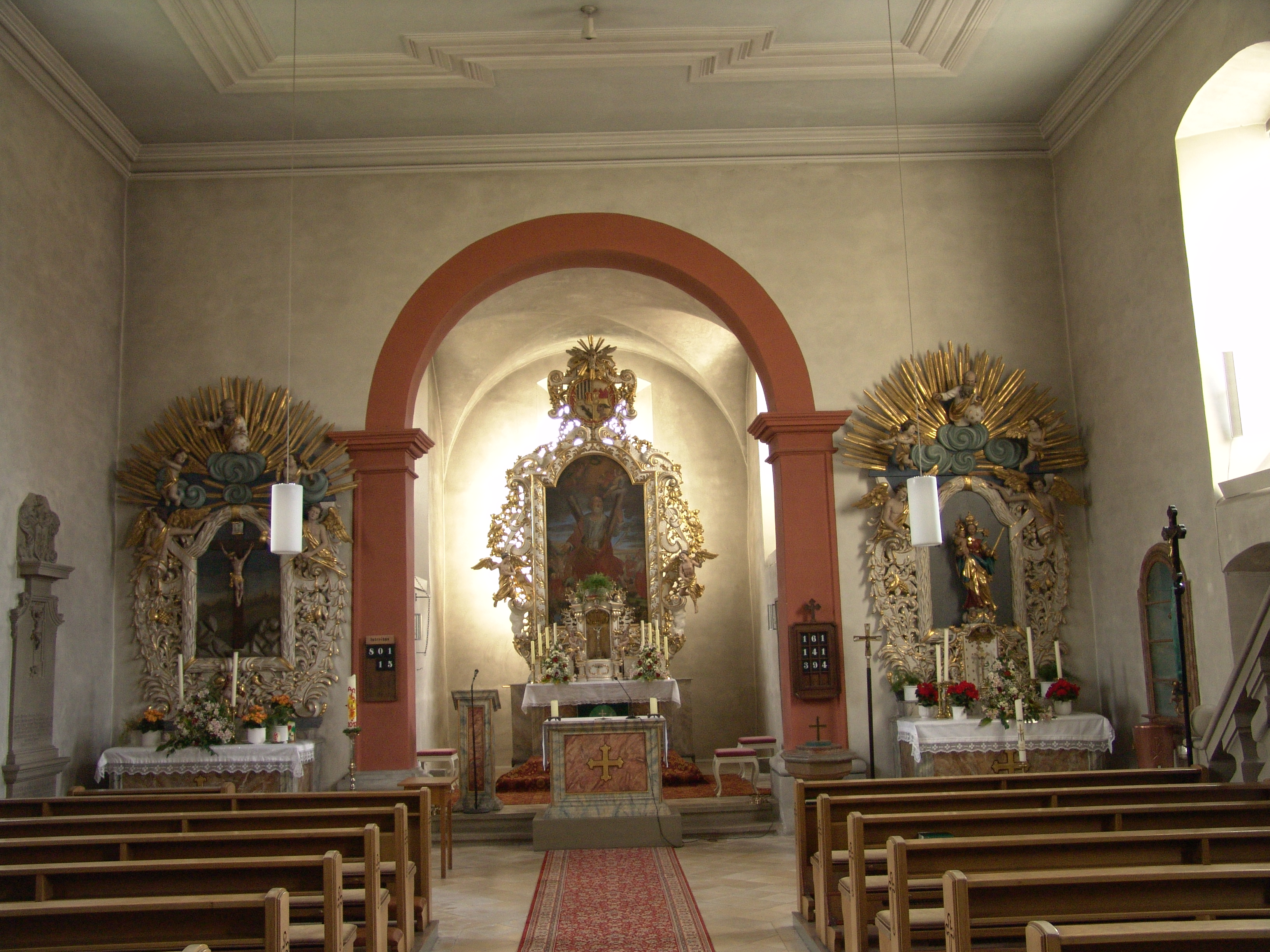 Simultankirche St. Andreas in Kaltensondheim